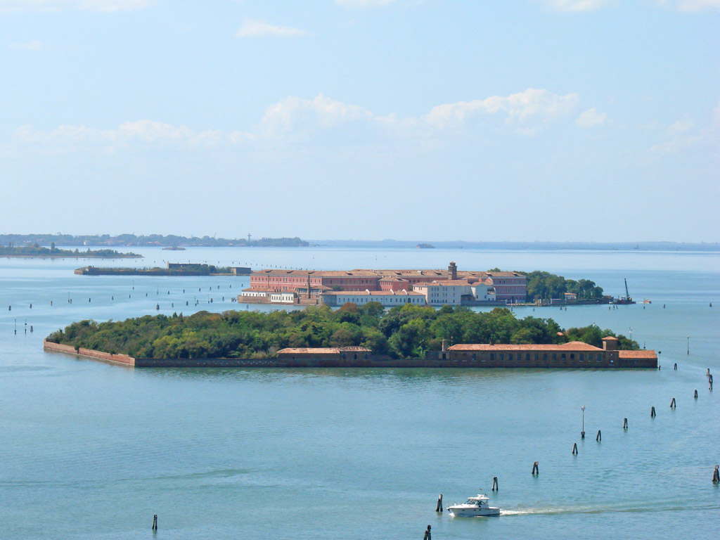 Depuis le premier plan : La Grazie, puis San Clemente, San Spirito et Poveglia : îles de la lagune de Venise